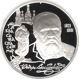 Монета Банка России — Серия: «Выдающиеся личности России», 175-летие со дня рождения Ф.М. Достоевского, 2 рубля, реверс.